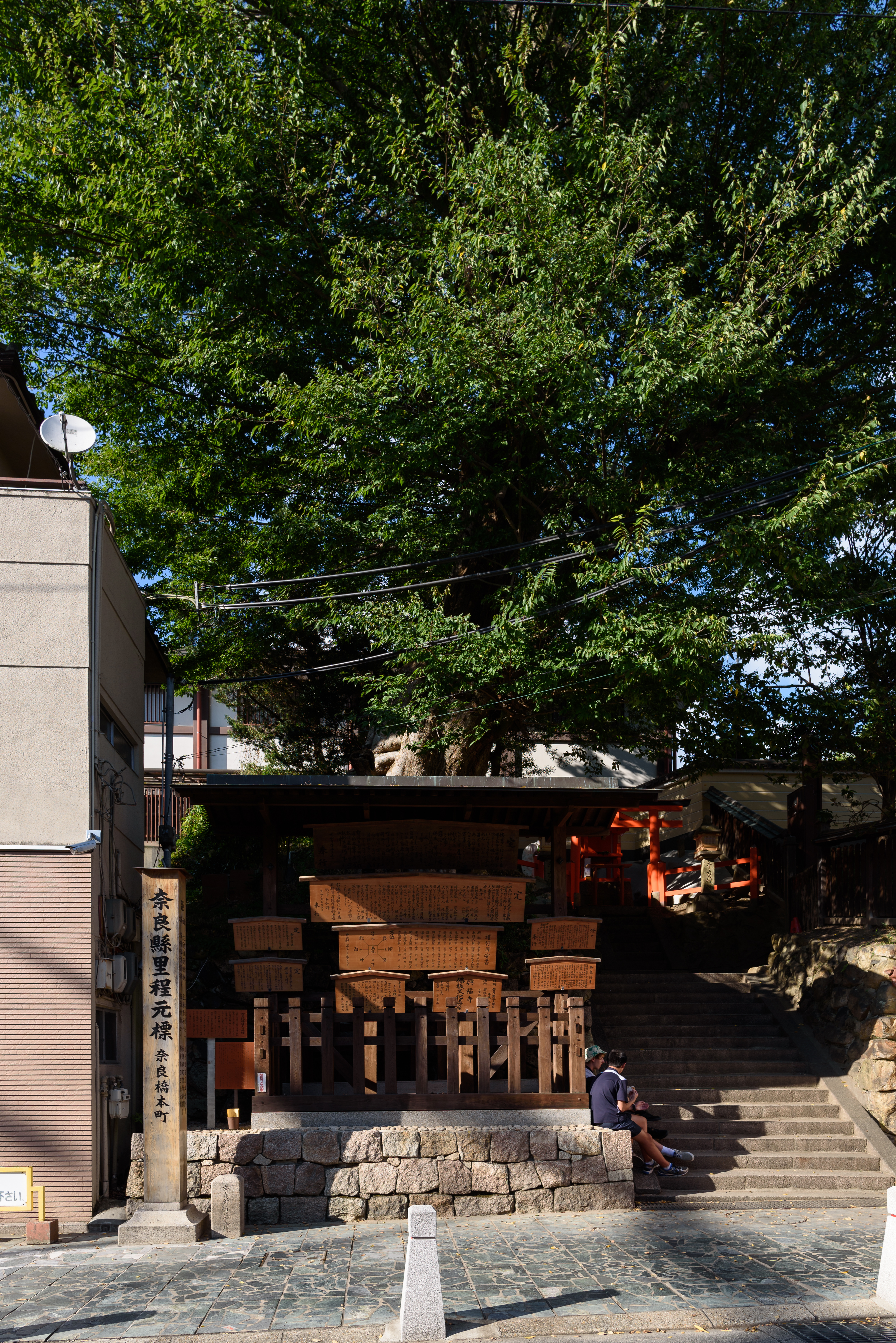 奈良県里程元標と御高札場（奈良市橋本町）